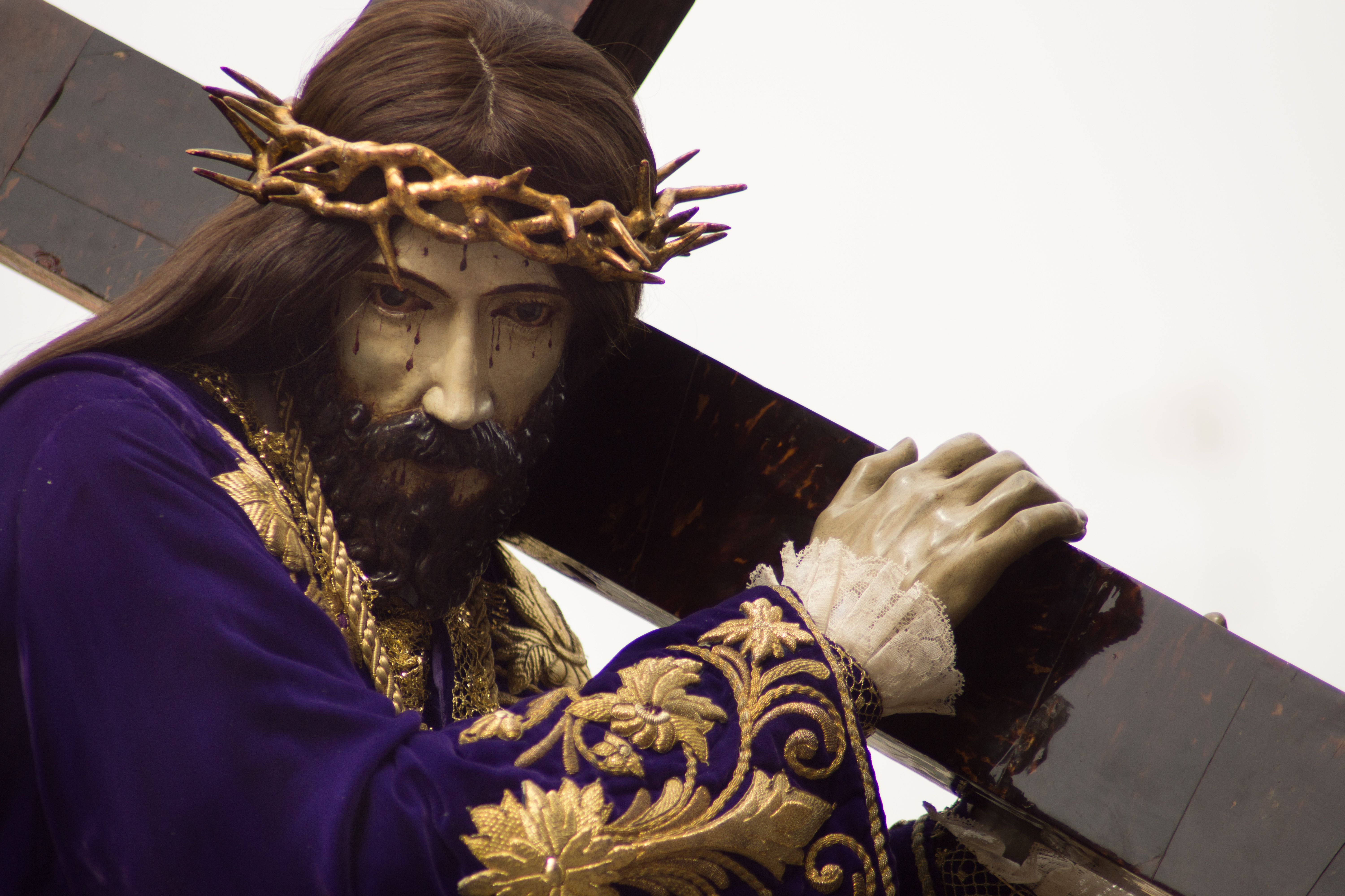 Procesión de Nuestro Padre Jesús Nazareno o de los Salzillos. Jesús Nazareno.Francisco Salzillo. This is a photography of a Folklore festival in Spain (Wikidata id Q5685566).